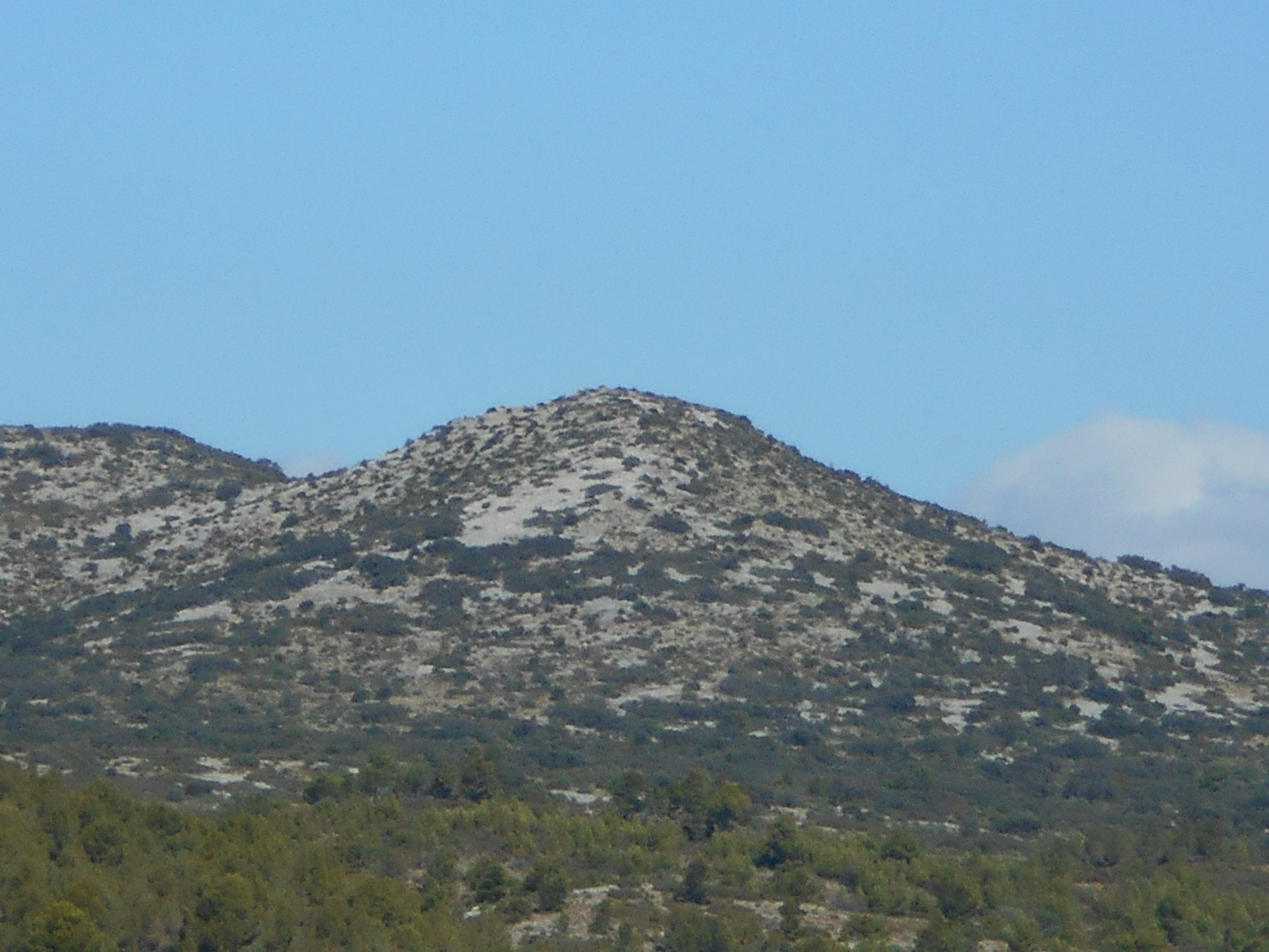 El Puig Burgat. Cases de Pena